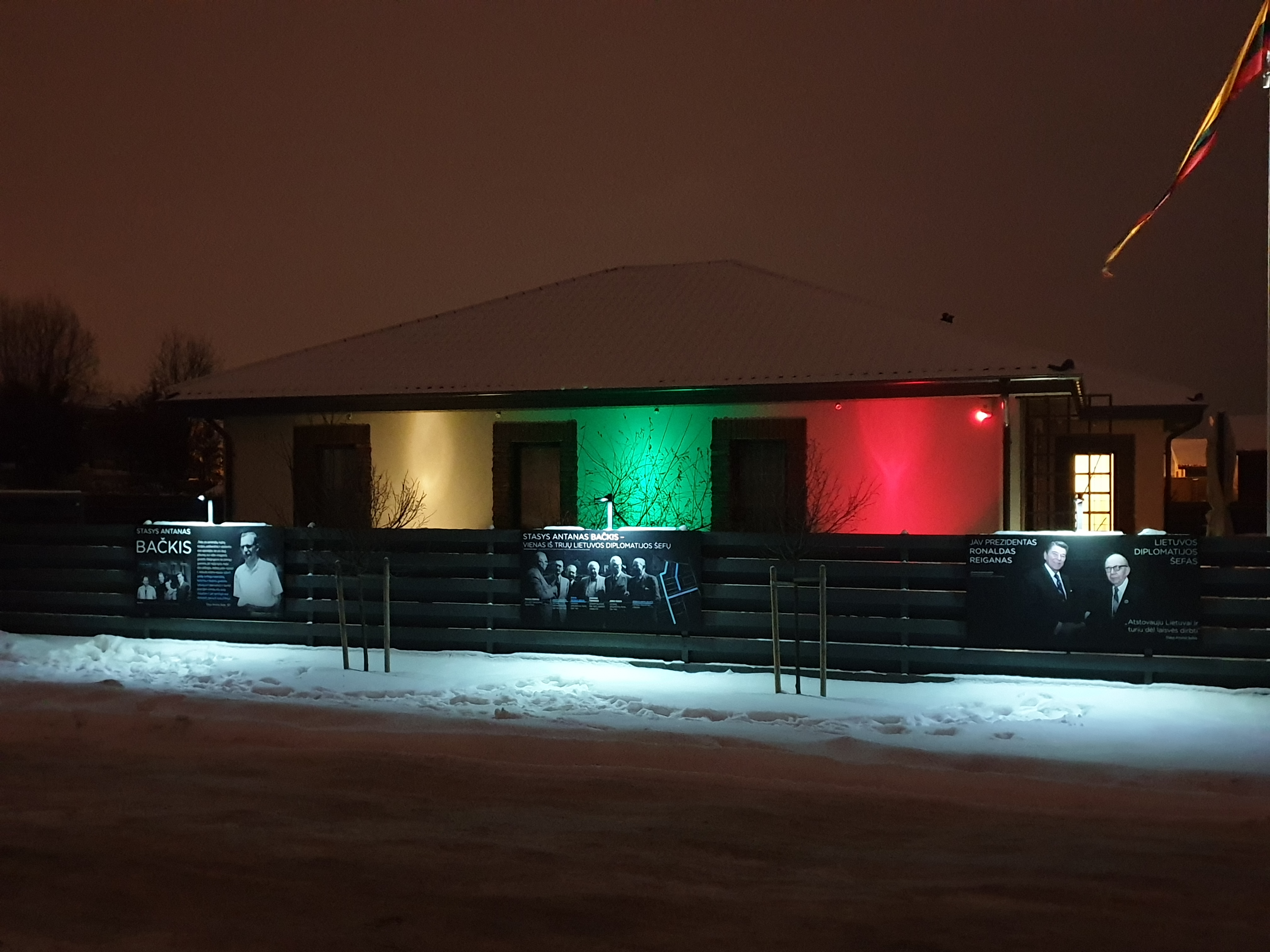 Lietuvos diplomatijos šefą Stasį Antaną Bačkį pristatantys stendai jo vardo gatvėje.